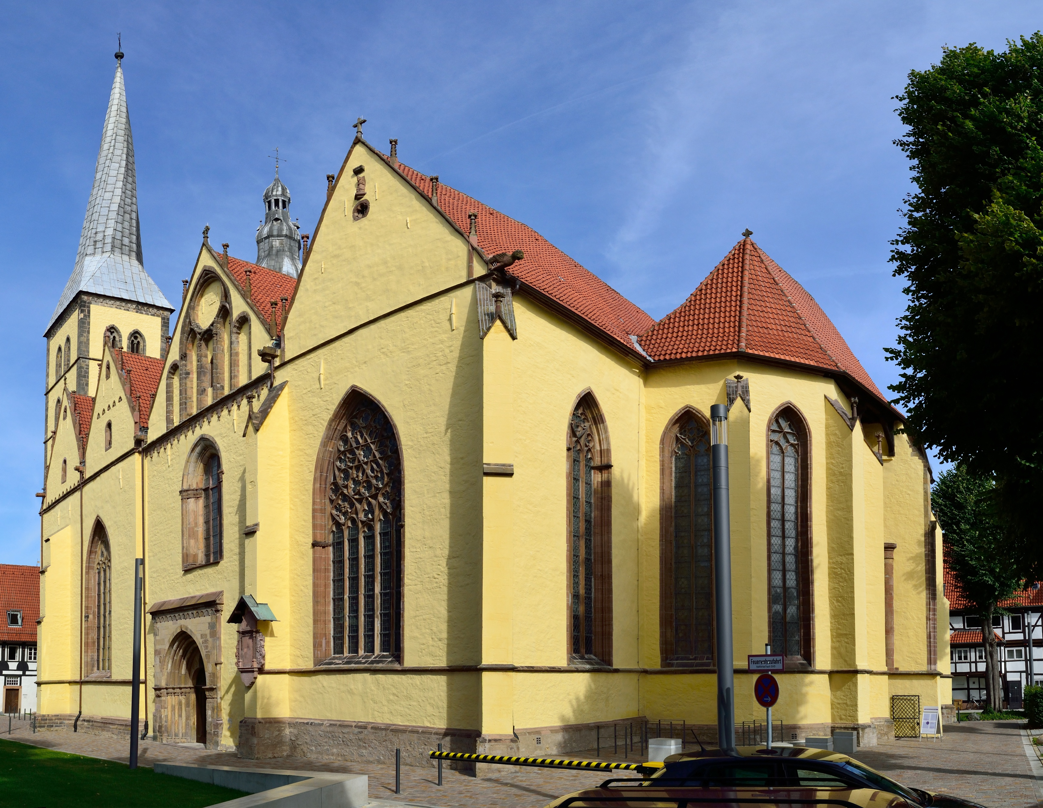 evangelisch-lutherische Kirche St. Nicolai in Lemgo